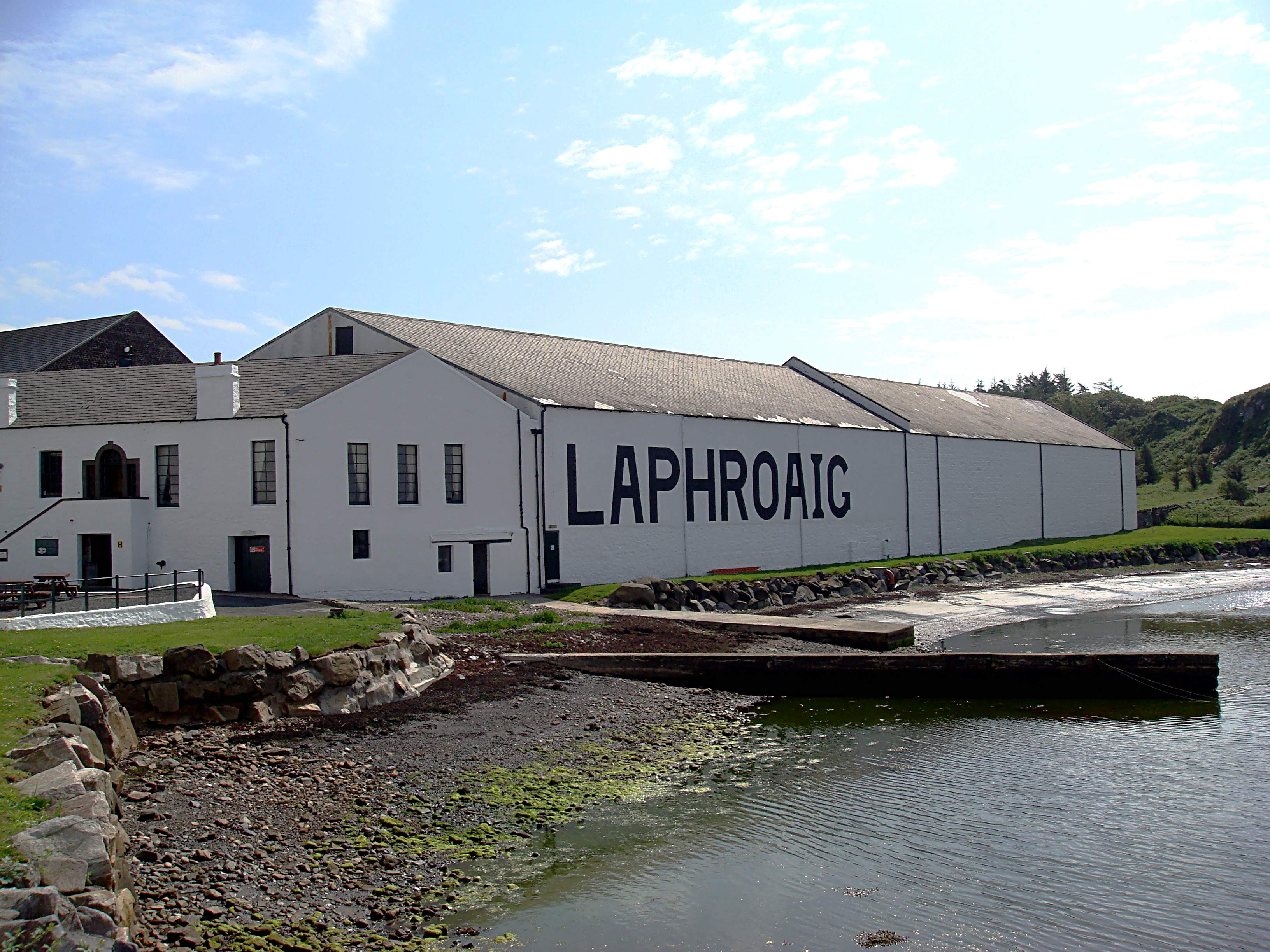 Laphroaig Whiskybrennerei